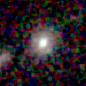 Galaxy NGC 85